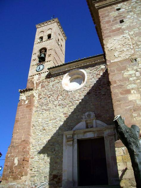 Esglèsia de Nuestra Señora de las Nieves